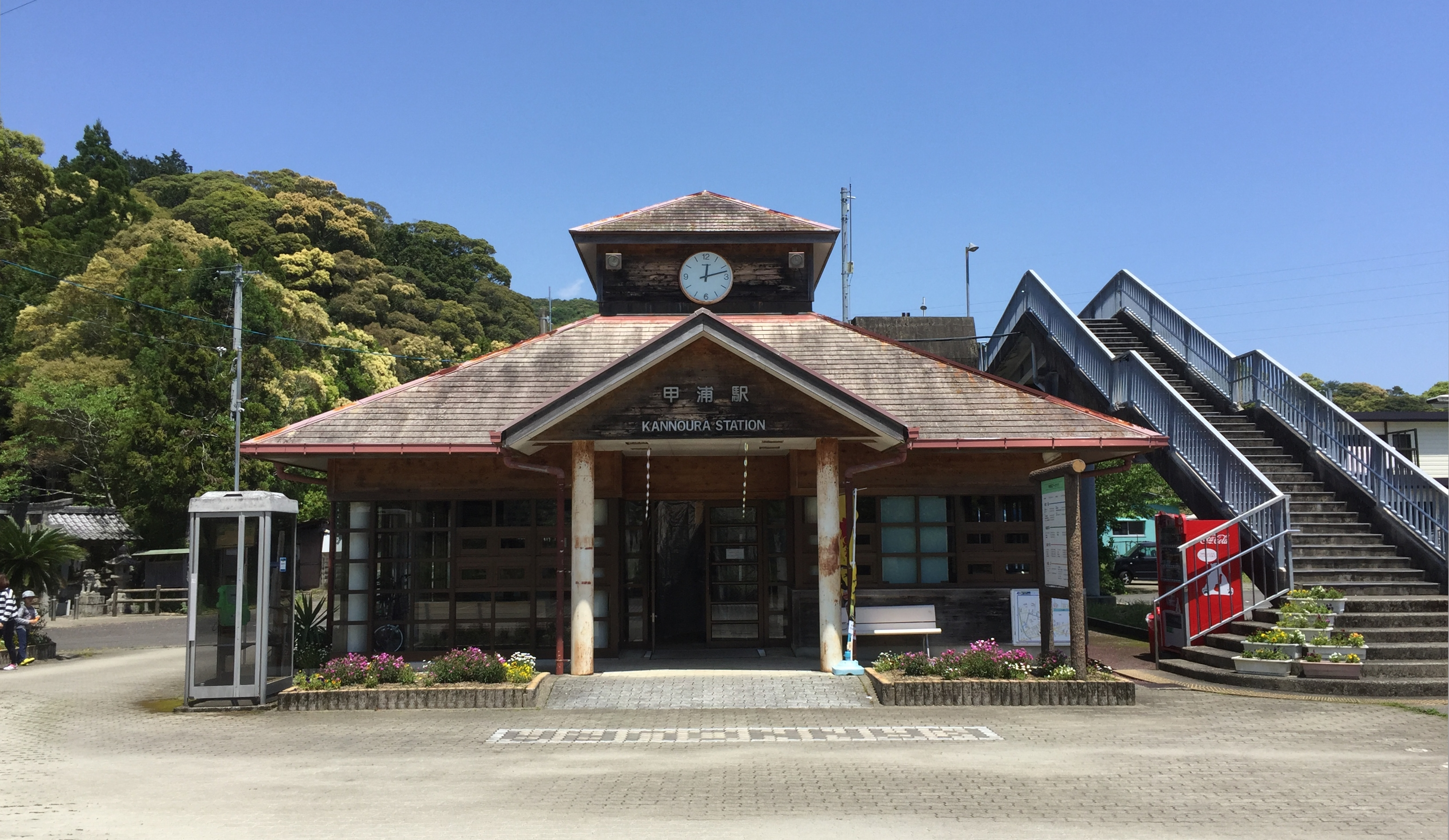 甲浦駅駅舎